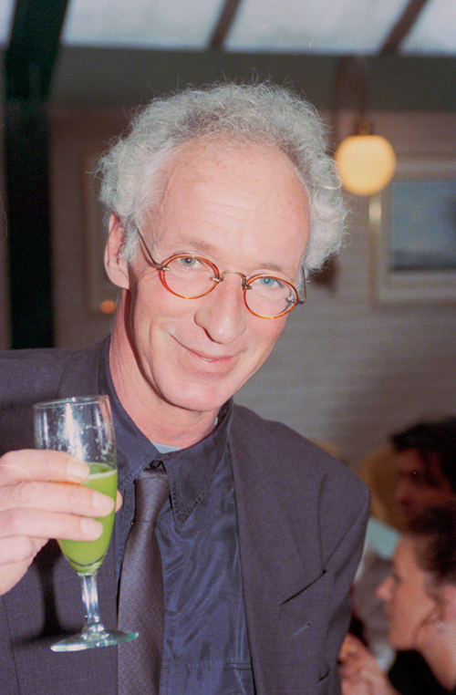 Wik Jongsma